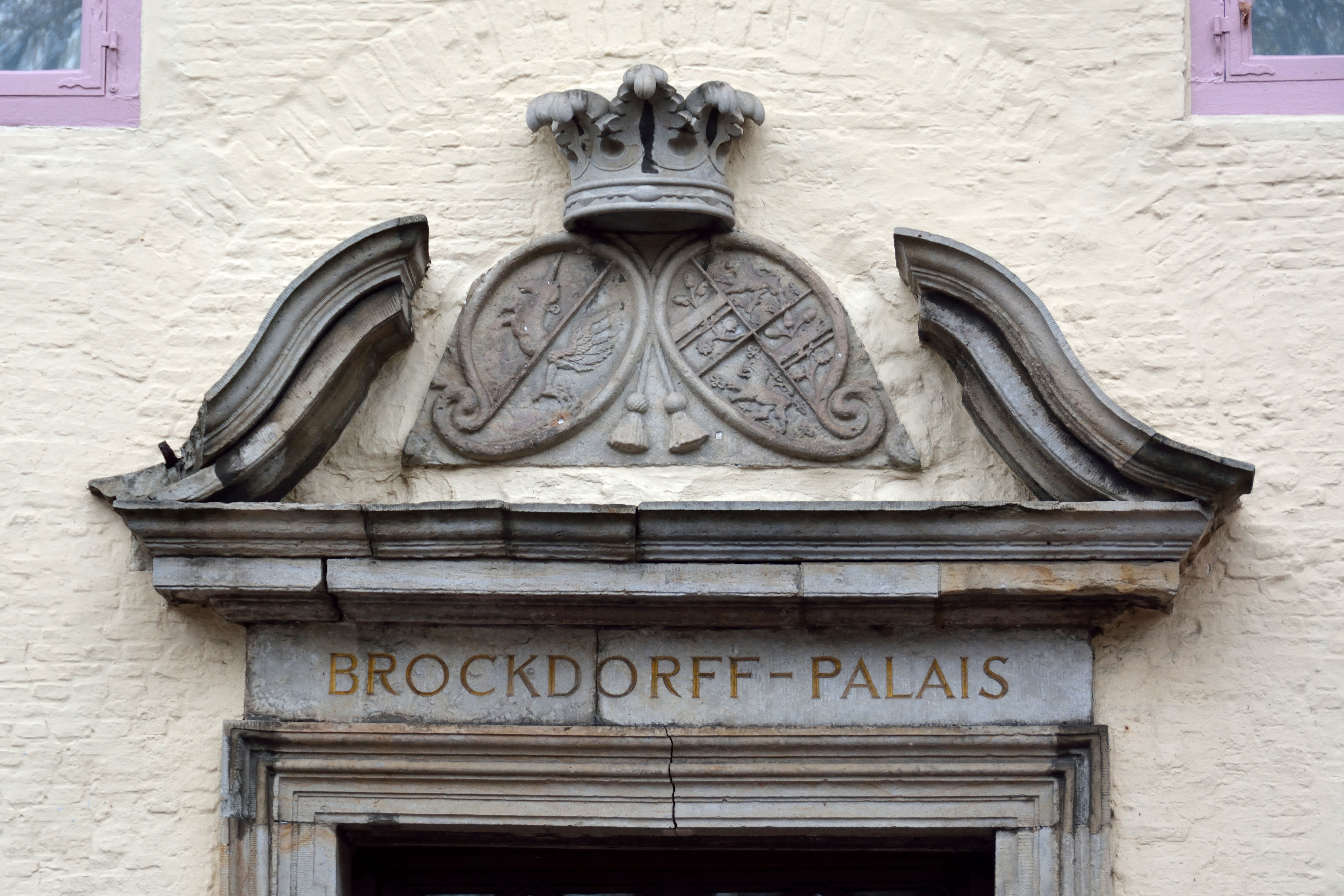 Eingang am Brockdorff-Palais in Glückstadt